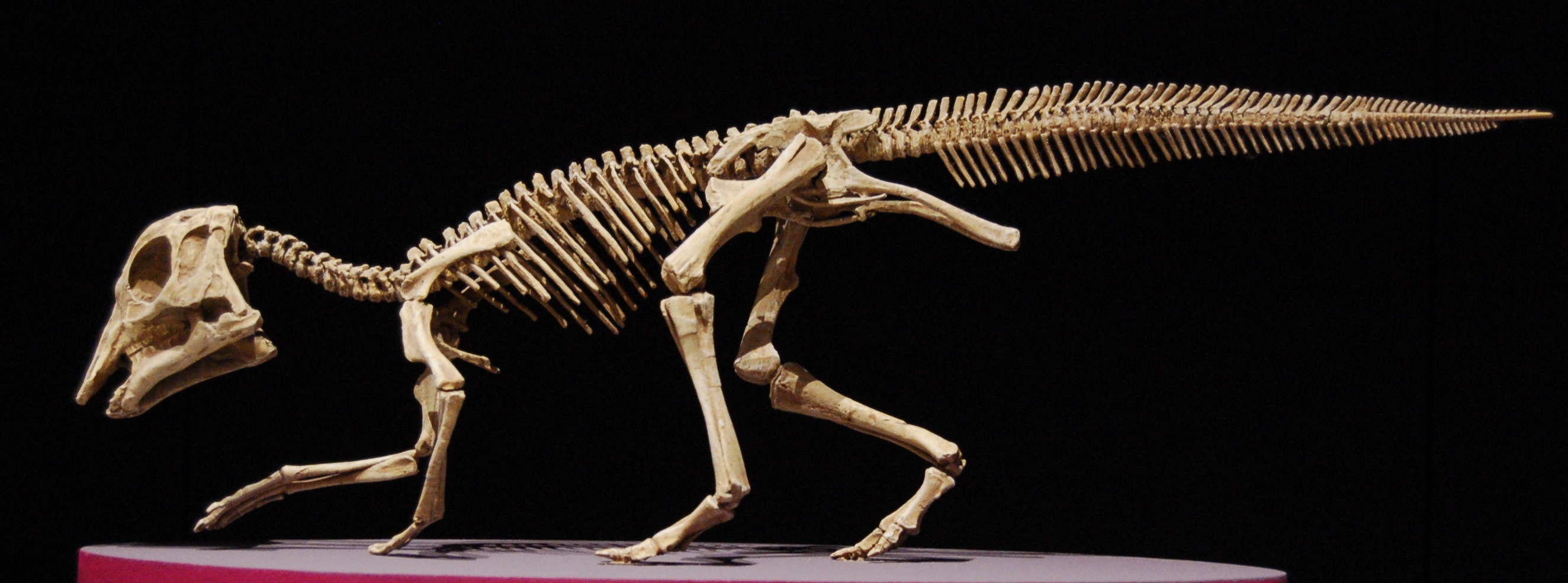 Squelette d'Hypacrosaurus bébé.